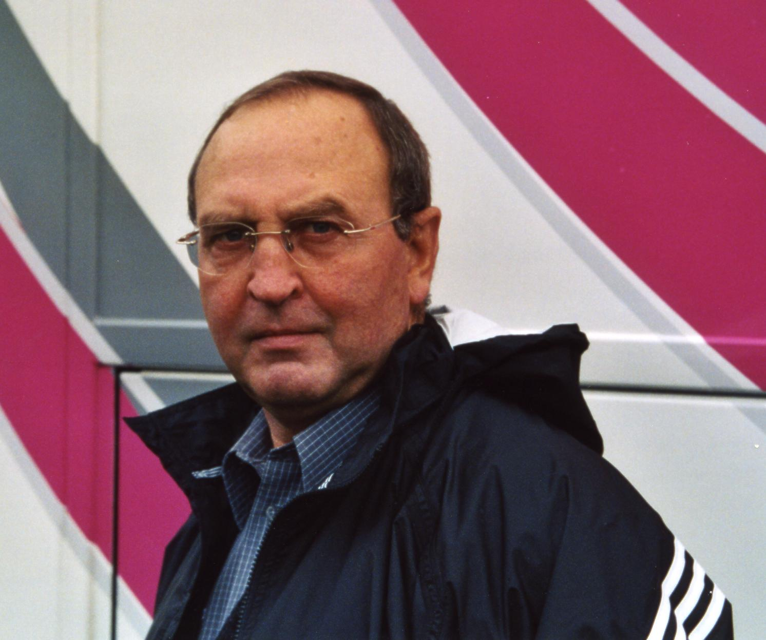 PARIS-NICE 1997